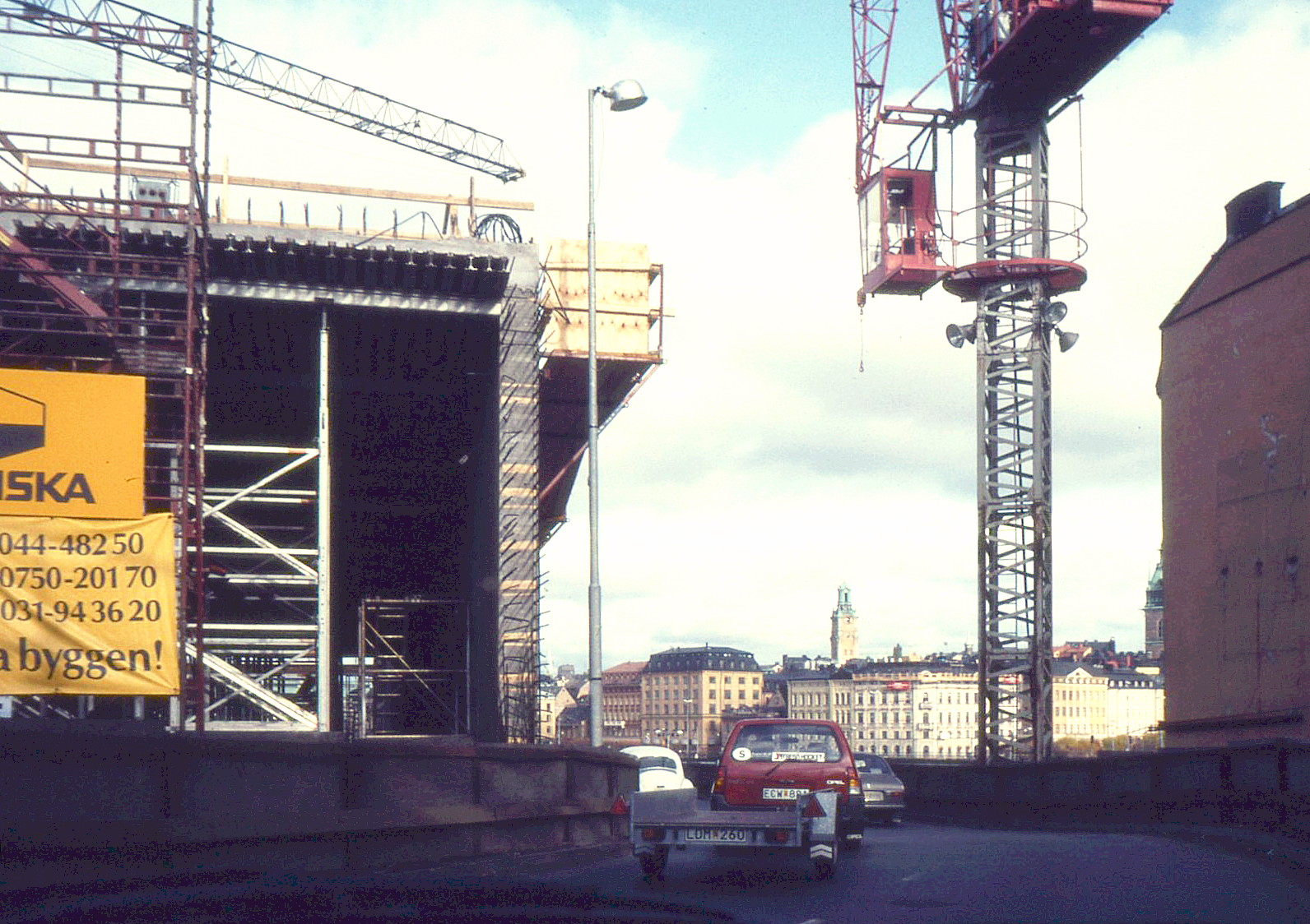 Söderledstunneln under byggnad 1984, Stockholm